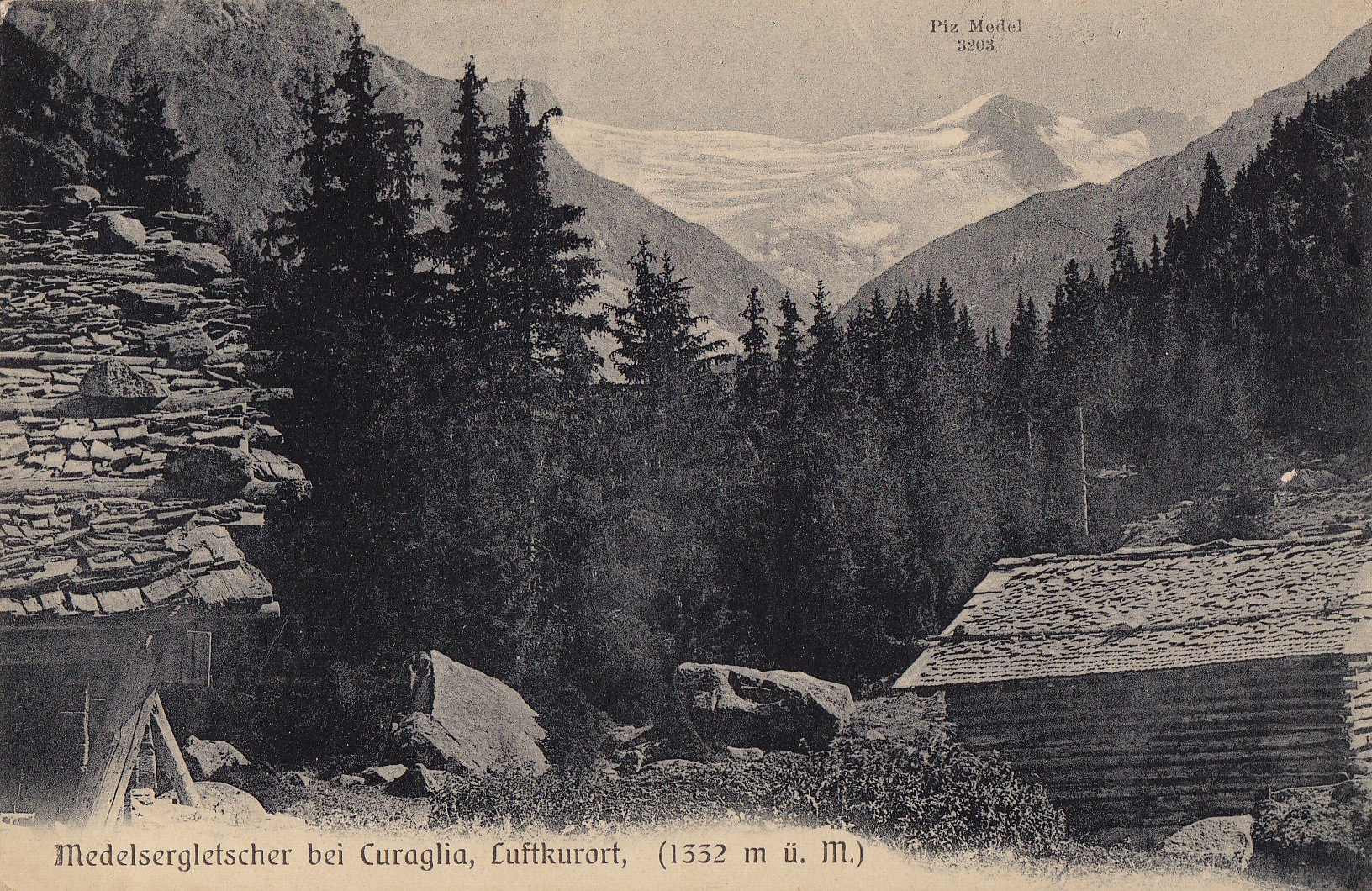 Val Plattas, Piz Medel und Medelsergletscher – Ansichtskarte von 1905. Aufdruck "Medelsergletscher bei Curaglia, Luftkurort, (1332 m ü. M.)" sowie "Piz Medel 3203"